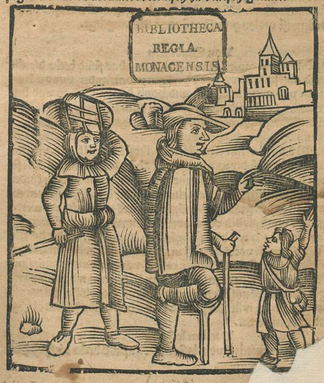 Titelholzschnitt des 1510 in Pforzheim erschienenen Liber Vagatorum